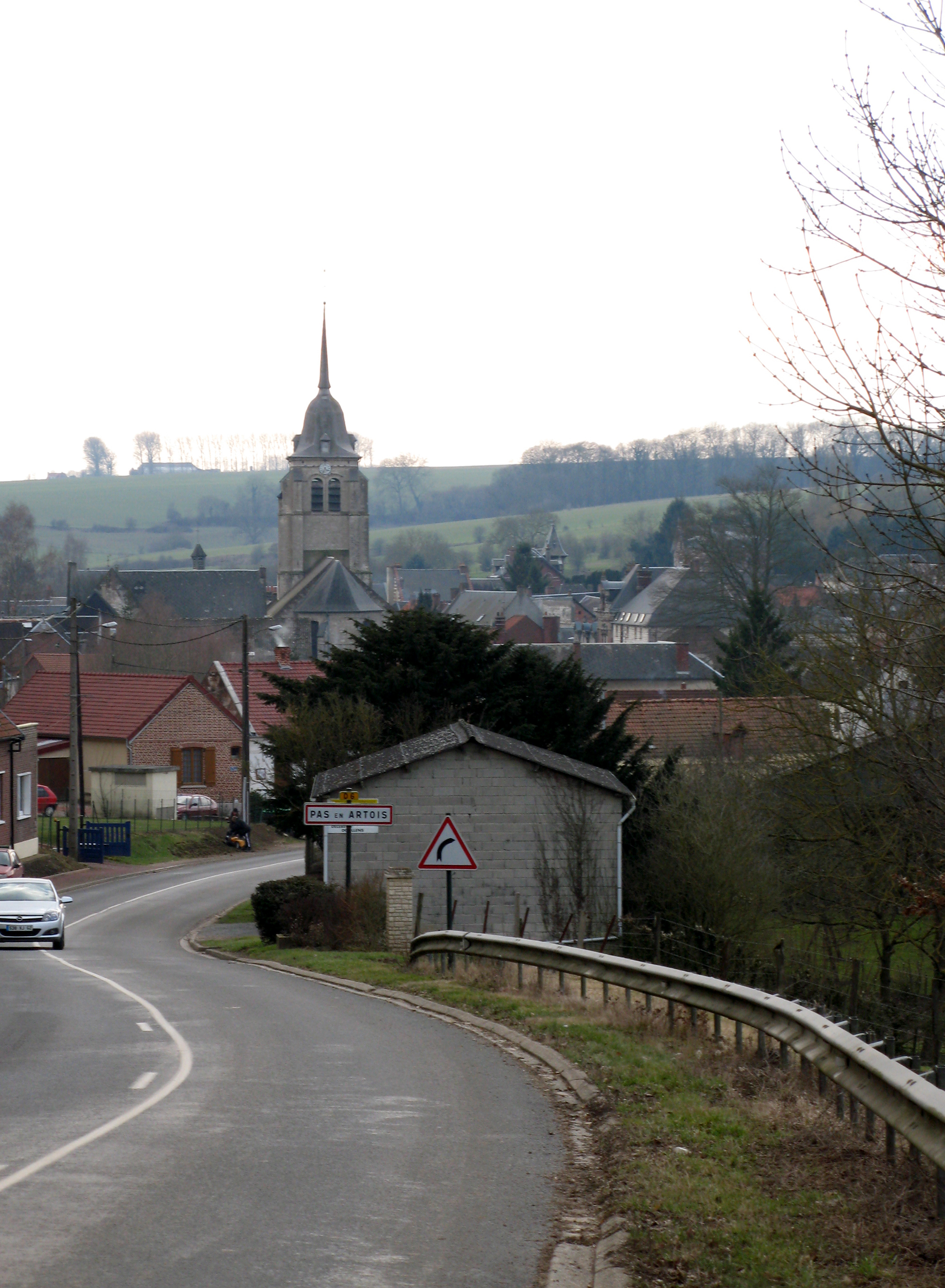 Pas-en-Artois (Pas-de-Calais, France) - Panorama sur la ville.